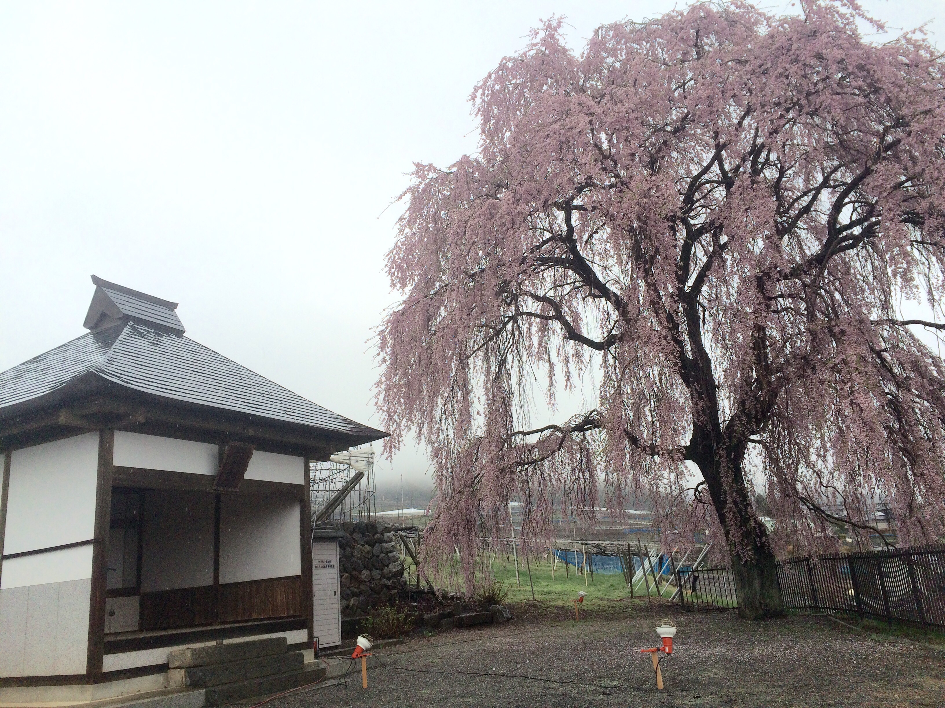 山梨市牧丘町倉科に鎮座する「第六天魔王」と境内のシダレザクラ。